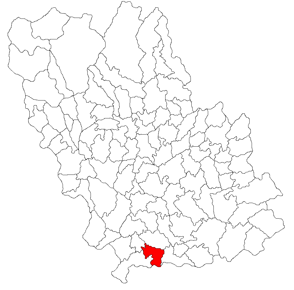 Categorie:Hărţi ale judeţului Prahova